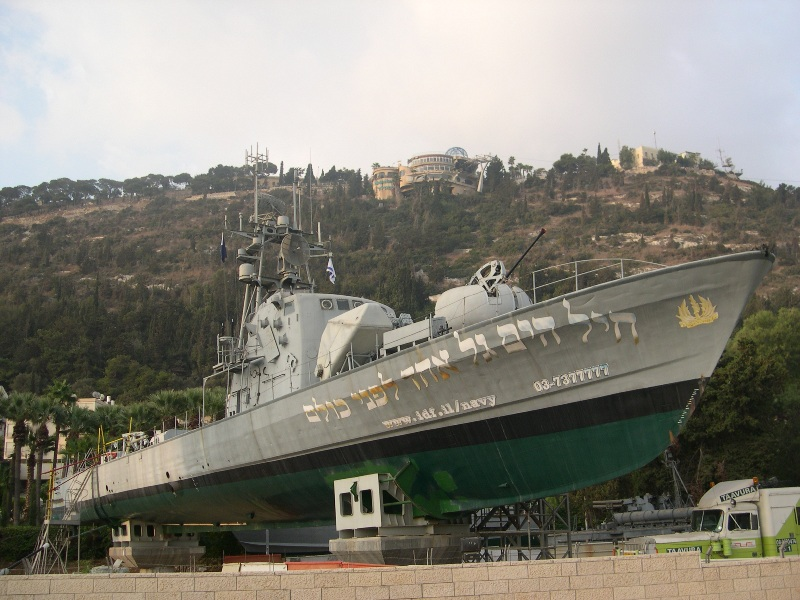 HN-INS Mivtach, אח"י מבטח